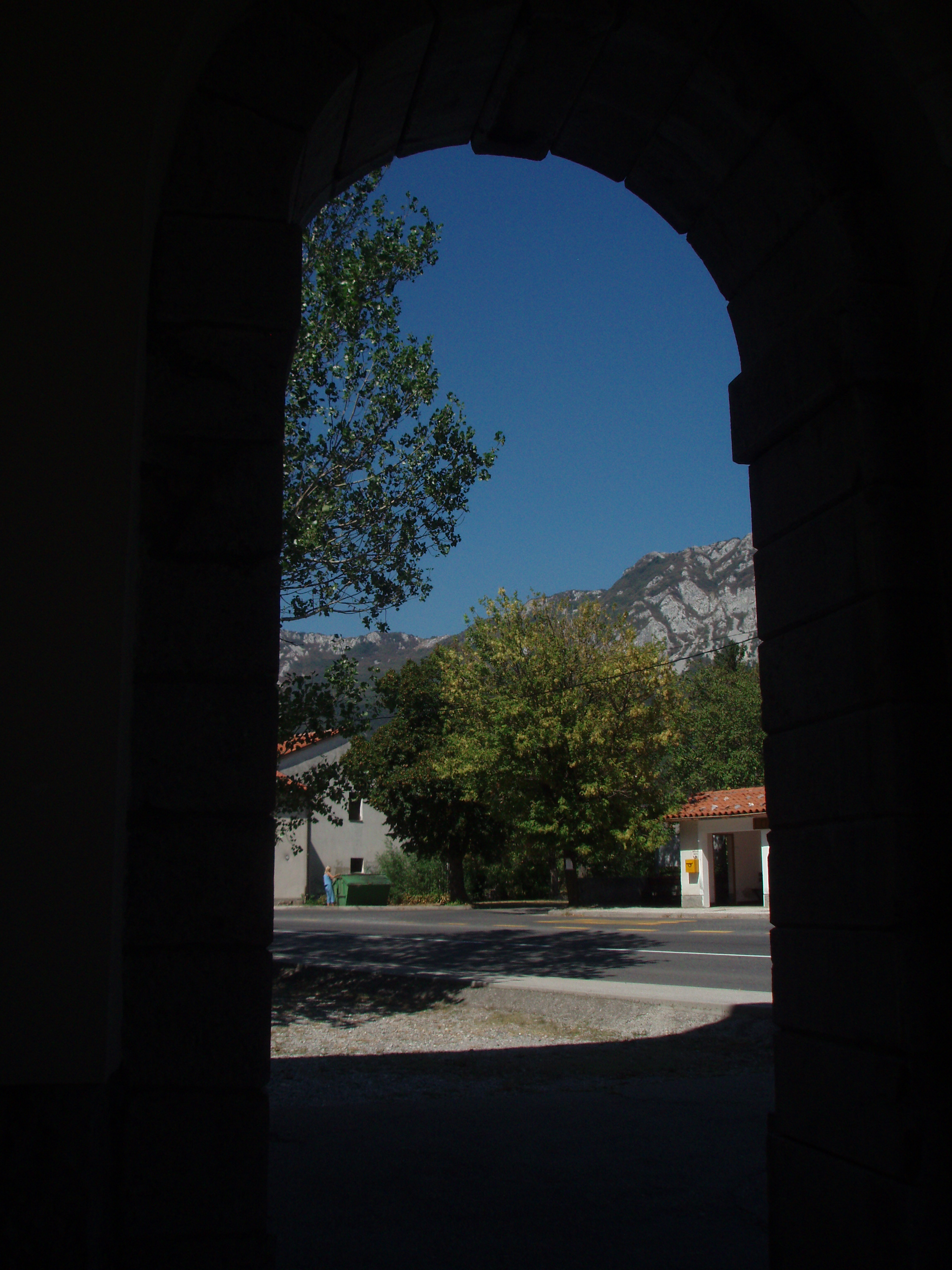 somewhere in Komen, Slovenia